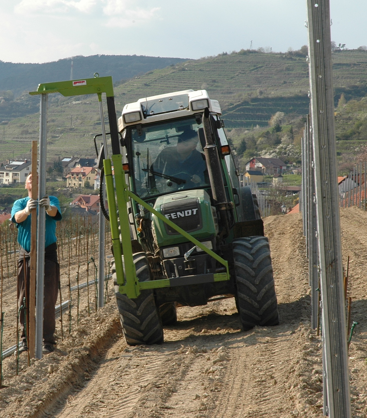 Pfahldrücker drückt Metallpfahl in der Stockreihe in den Boden.